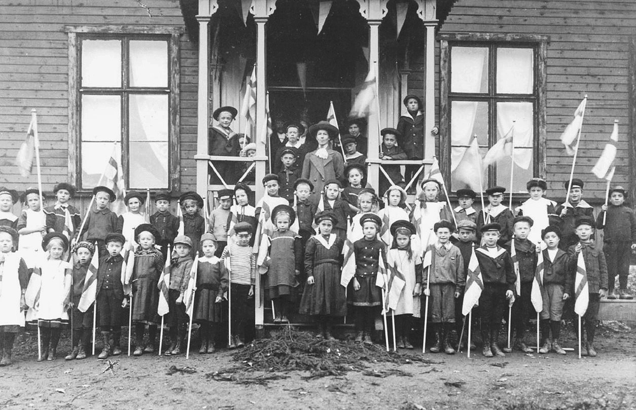 Viggestabergsskolan, skolklass anno 1912, Maria Andersson i mitten